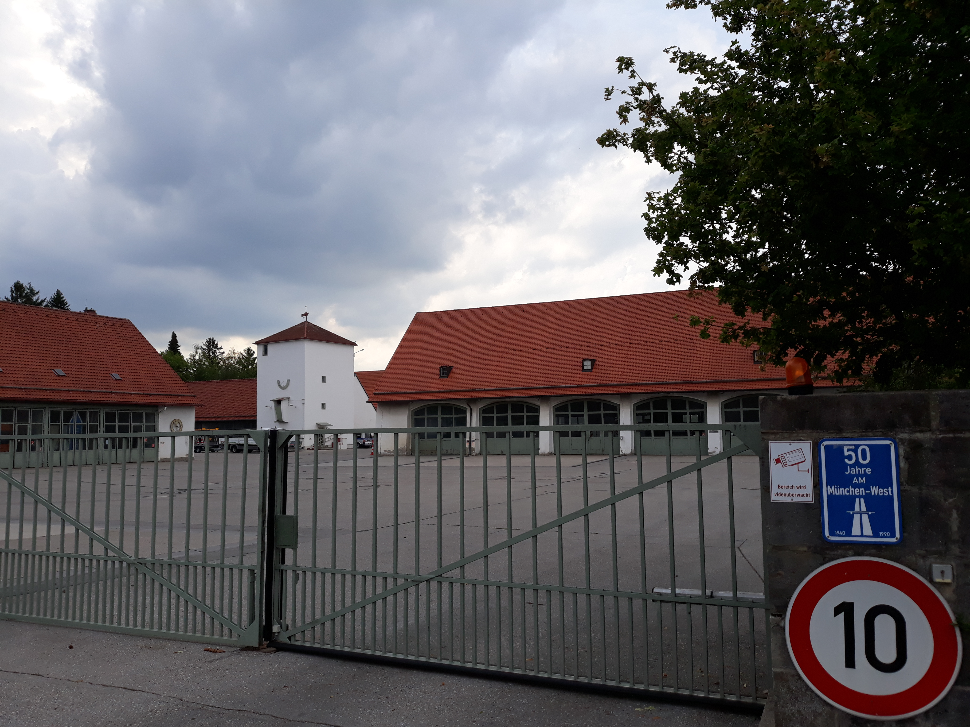 Die 1940 in zeittypischer Mounmentalarchitektur erbaute Autobahnmeisterei München-West an der A 8 in München-Obermenzing.